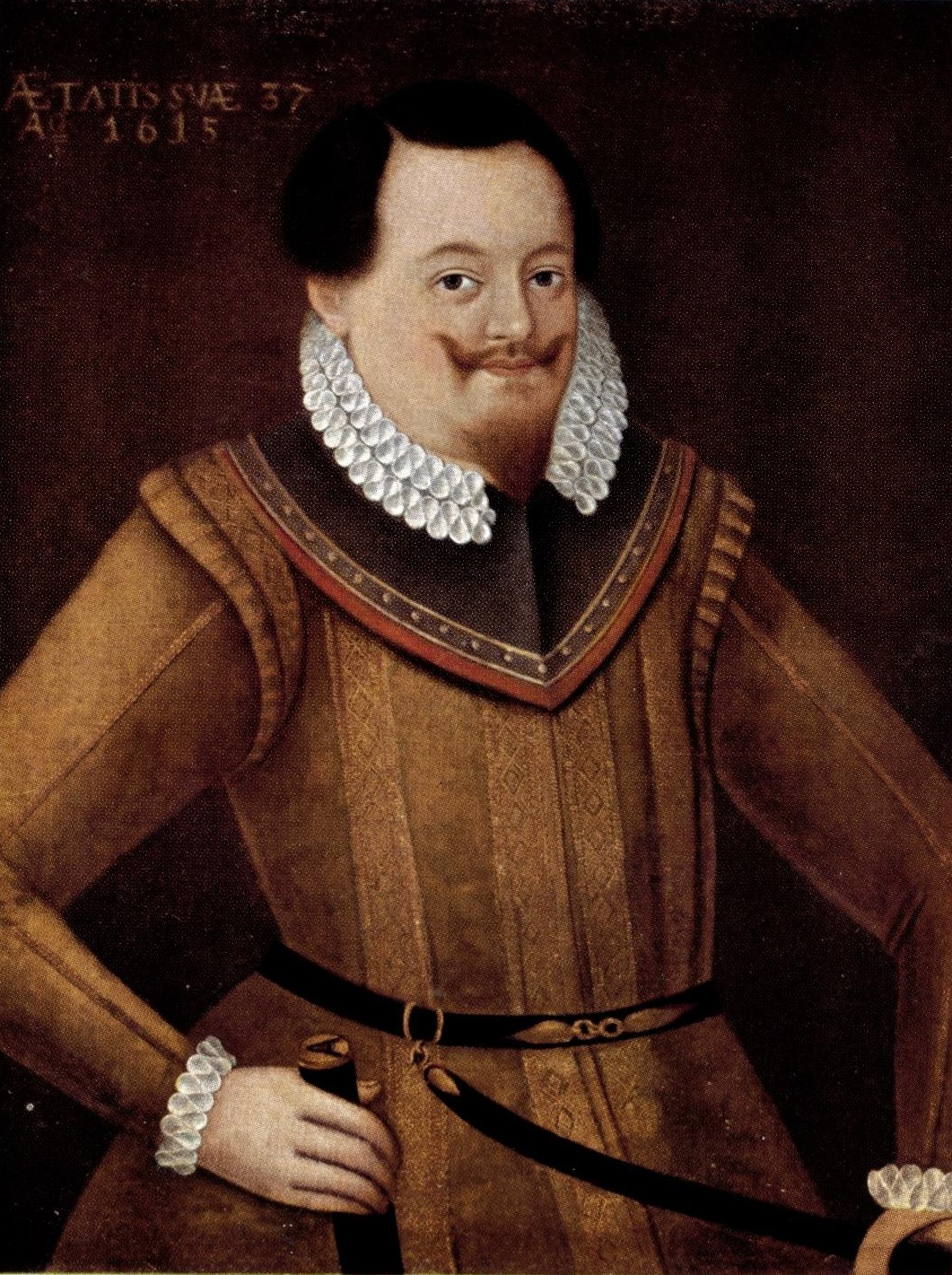 Volprecht Riedesel Freiherr zu Eisenbach (1578-1632), 11. Erbmarschall von Hessen